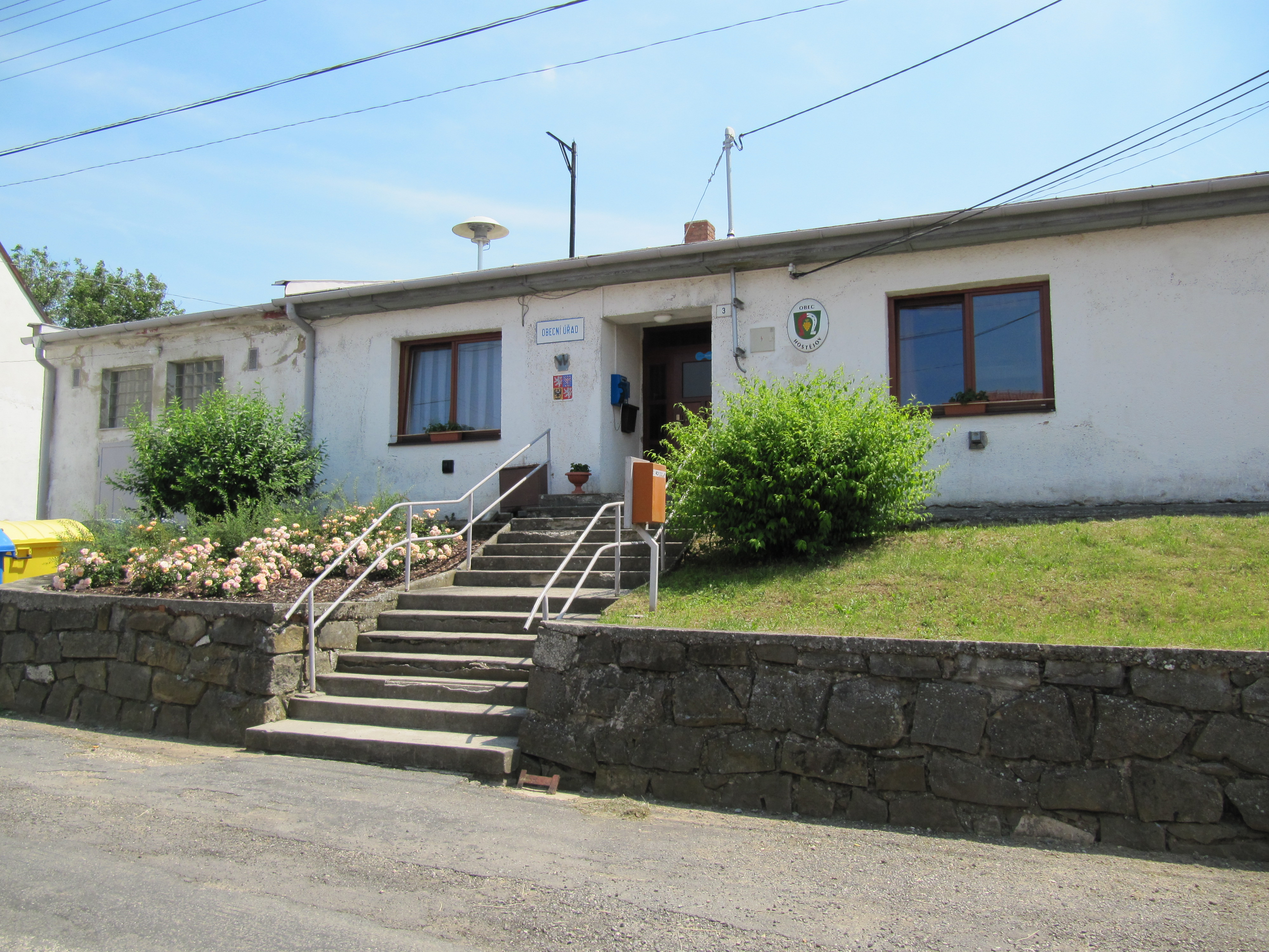 Hostějov